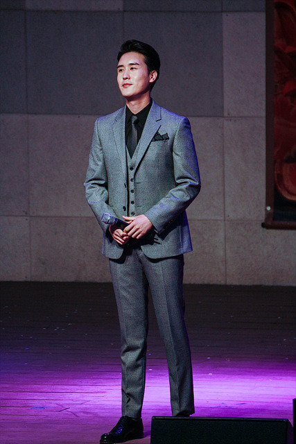 2017 04월 27일 고양 연등 문화 축제